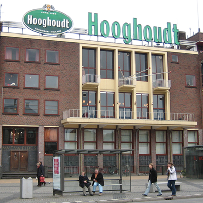 Mutua Fides te Groningen